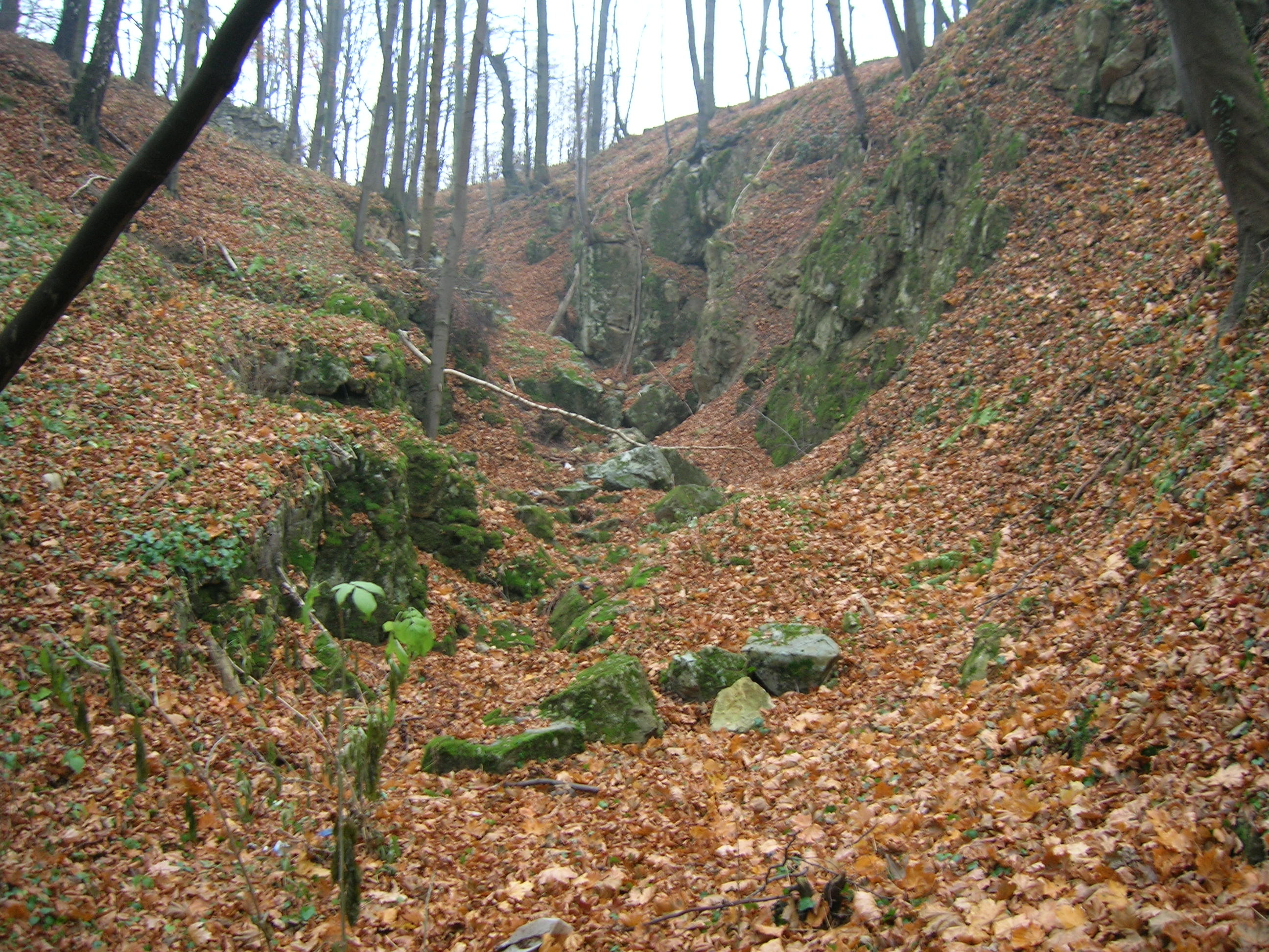 Wąwóz Kulenda.Wschód